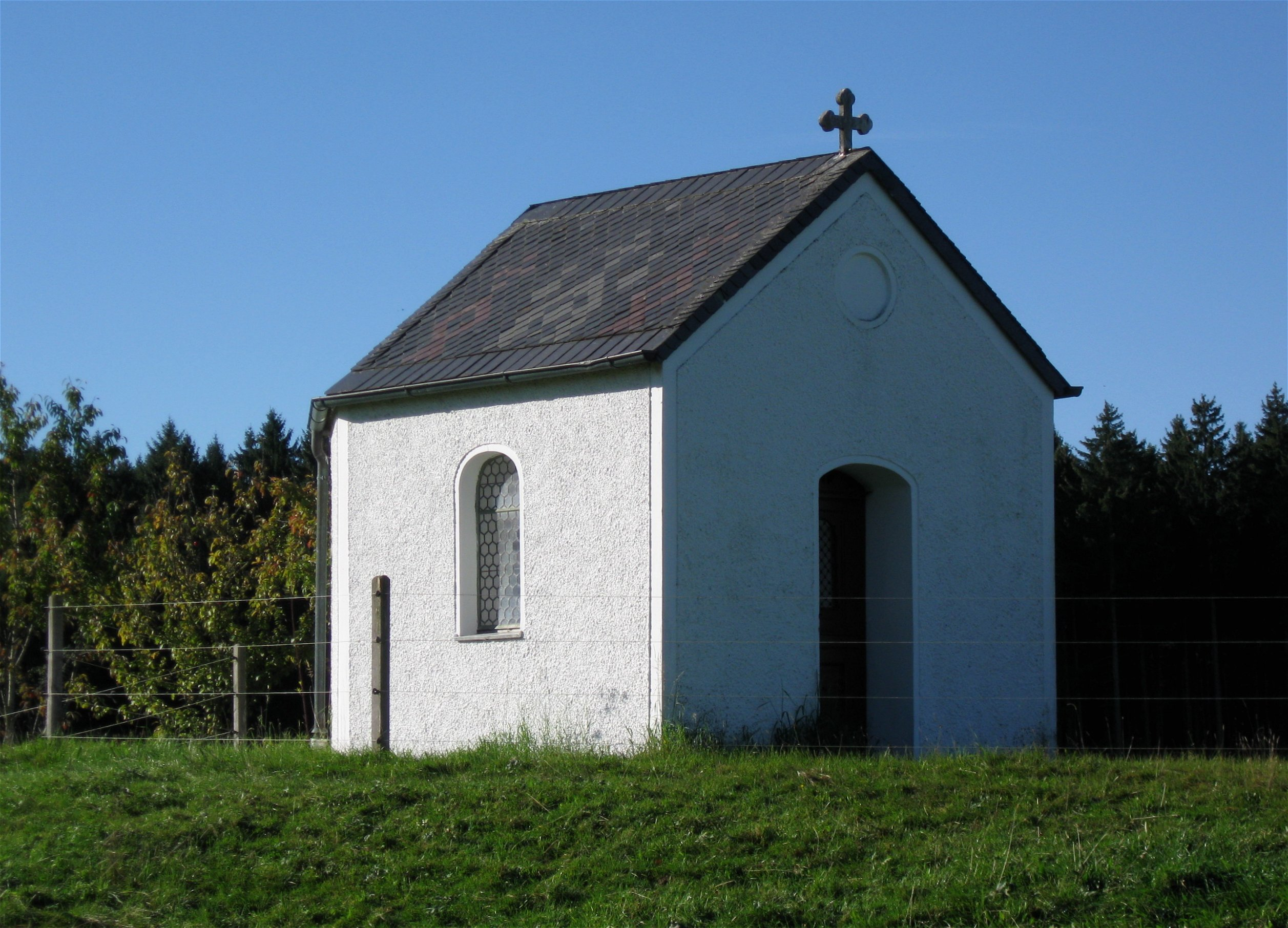 Blindham 1; Feldkapelle, kleiner Putzbau mit dreiseitigem Schluss, im Inneren Lourdesgrotte, 1890.